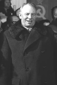 Factual corrections and alternative descriptions are encouraged separately from the original description. Additionally errors can be reported at this page to inform the Bundesarchiv. Original historic description: Berlin, VI. SED-Parteitag, Ulbricht, Chruschtschow Zentralbild /Junge 14.1.1963 N.S. Chruschtschow in Berlin eingetroffen Der Erste Sekretär des ZK der KPdSU, N.S. Chruschtschow, traf am Abend des 14.1.1963 an der Spitze der sowjetischen Delegation zum VI. Parteitag der SED in der Hauptstadt der DDR ein. Die repräsentative Abordnung der sowjetischen Bruderpartei wurde auf dem Berliner Ostbahnhof vom Ersten Sekretär der ZK der SED, Walter Ulbricht, und weiteren Mitgliedern des Politbüros herzlich willkommen geheißen. UBz: Während der Begrüßungskundgebung in der Vorhalle des Ostbahnhofes. (V.l.n.r.) Nikolia Podgorny, Mitglied des Prasidiums des ZK der KPdSU und Erster Sekretär des ZK der KP der Ukraine, Walter Ulbricht, N.S. Chruschtschow und der Kandidat des Politbüros der ZK der SED und 1. Sekretär der Bezirksleitung Groß-Berlin der SED Paul Verner. Abgebildete Personen: * Chruschtschow, Nikita S.: Ministerpräsident, erster Sekretär der KP, Sowjetunion (GND 118638378) * Podgorny, Nikolai: Vorsitzender des Präsidiums des Obersten Sowjets, Sowjetunion * Ulbricht, Walter: Staatsratsvorsitzender, Erster Sekretär des Zentralkomitees (ZK) der SED, Vorsitzender des Nationalen Verteidigungsrates, DDR * Verner, Paul: Vorsitzender des Staatsrates, Sekretär des Zentralkomitees der SED, Präsident des Nationalrates der Nationalen Front, DDR